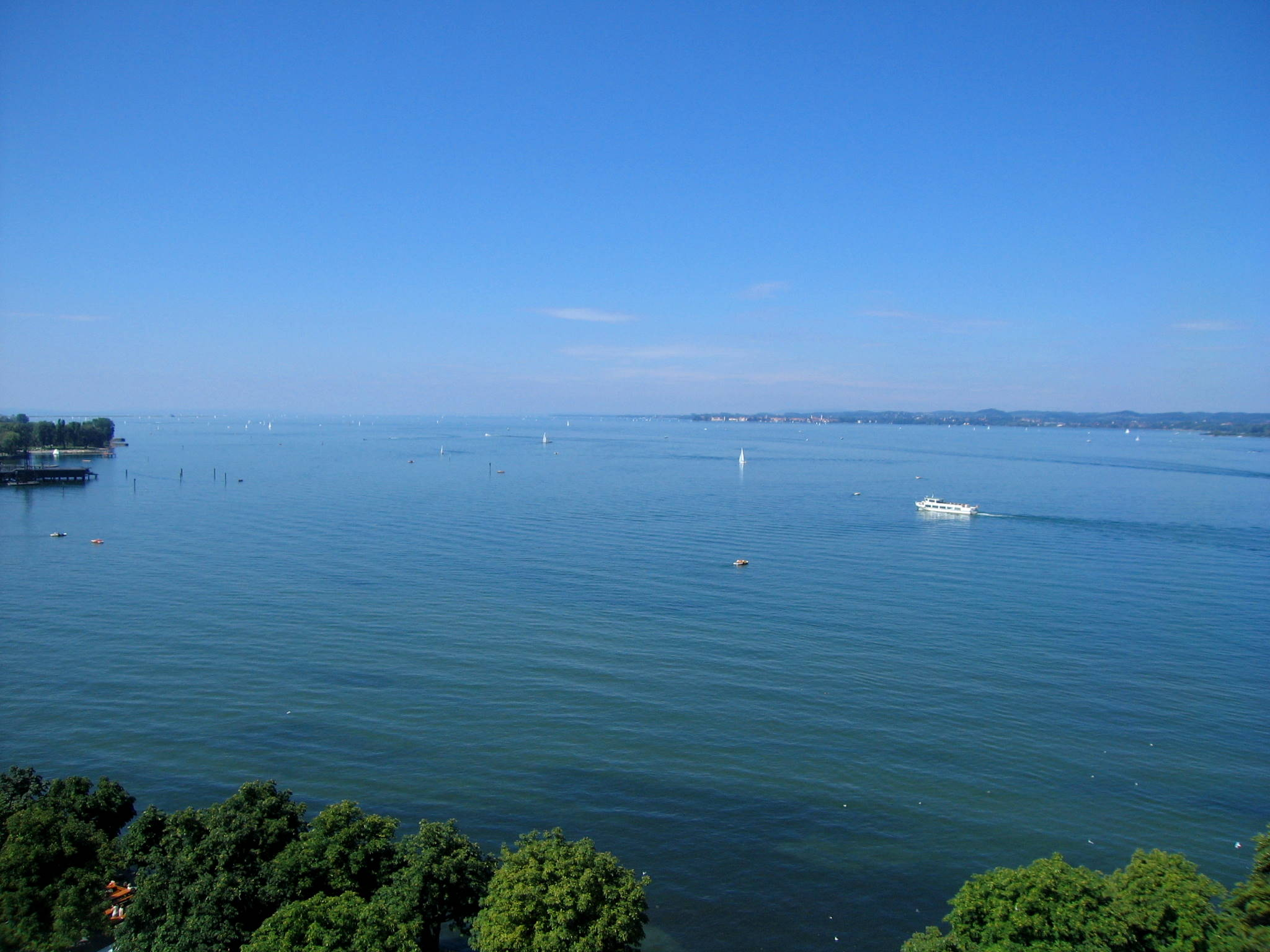 Description: Blick von Bregenz über den Bodensee; Source: own work; Date: 28.08.2004; Author: Florian Glöcklhofer